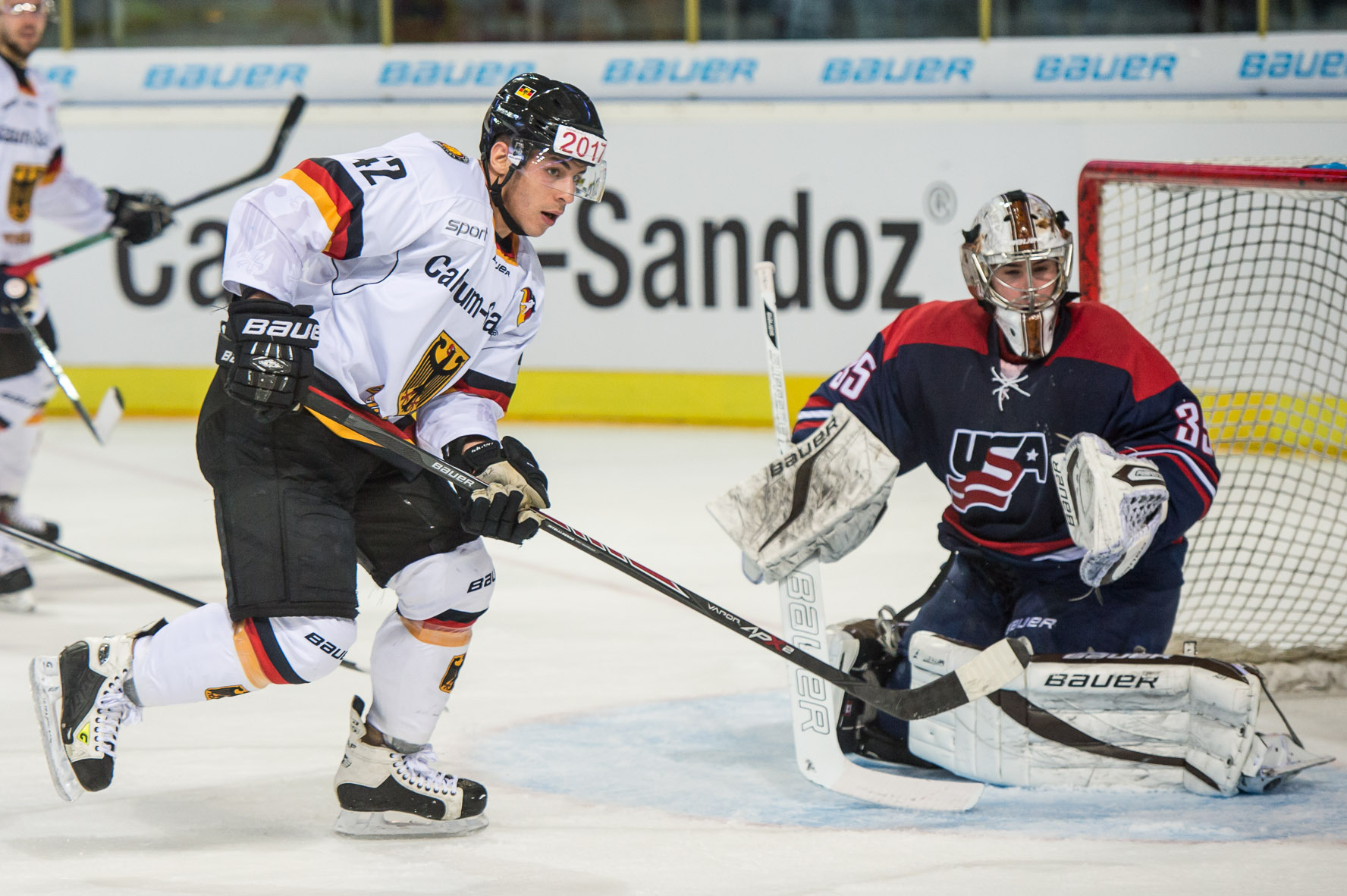 Yasin Ehliz im WM-Vorbereitungsspiel gegen die USA in Nürnberg vor US-Goalie David Leggio